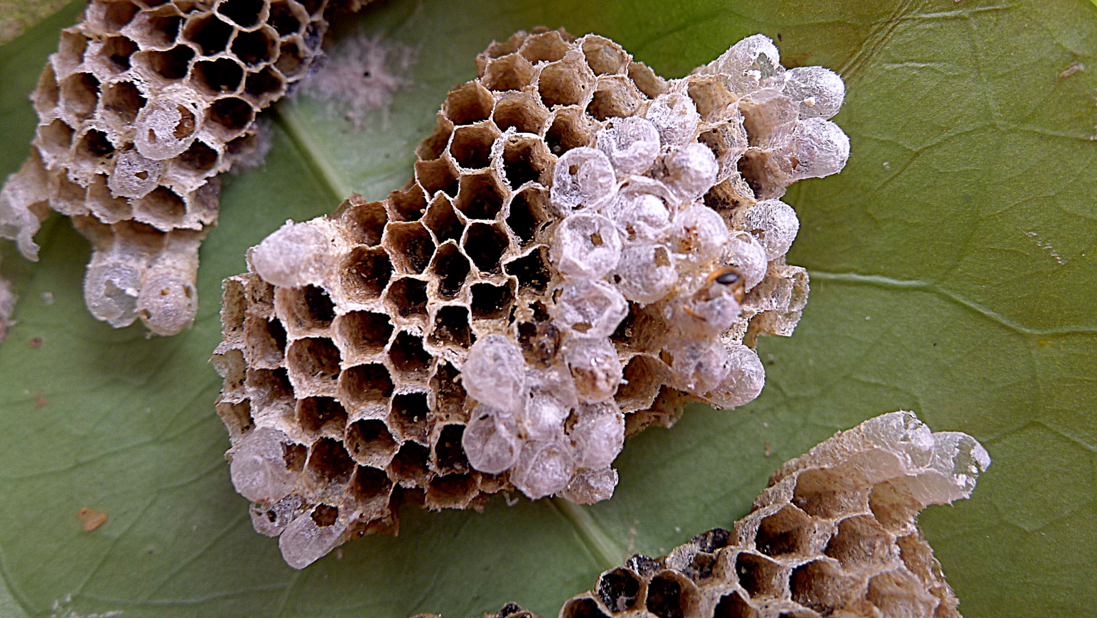 Leipomeles dorsata (Fabricius)